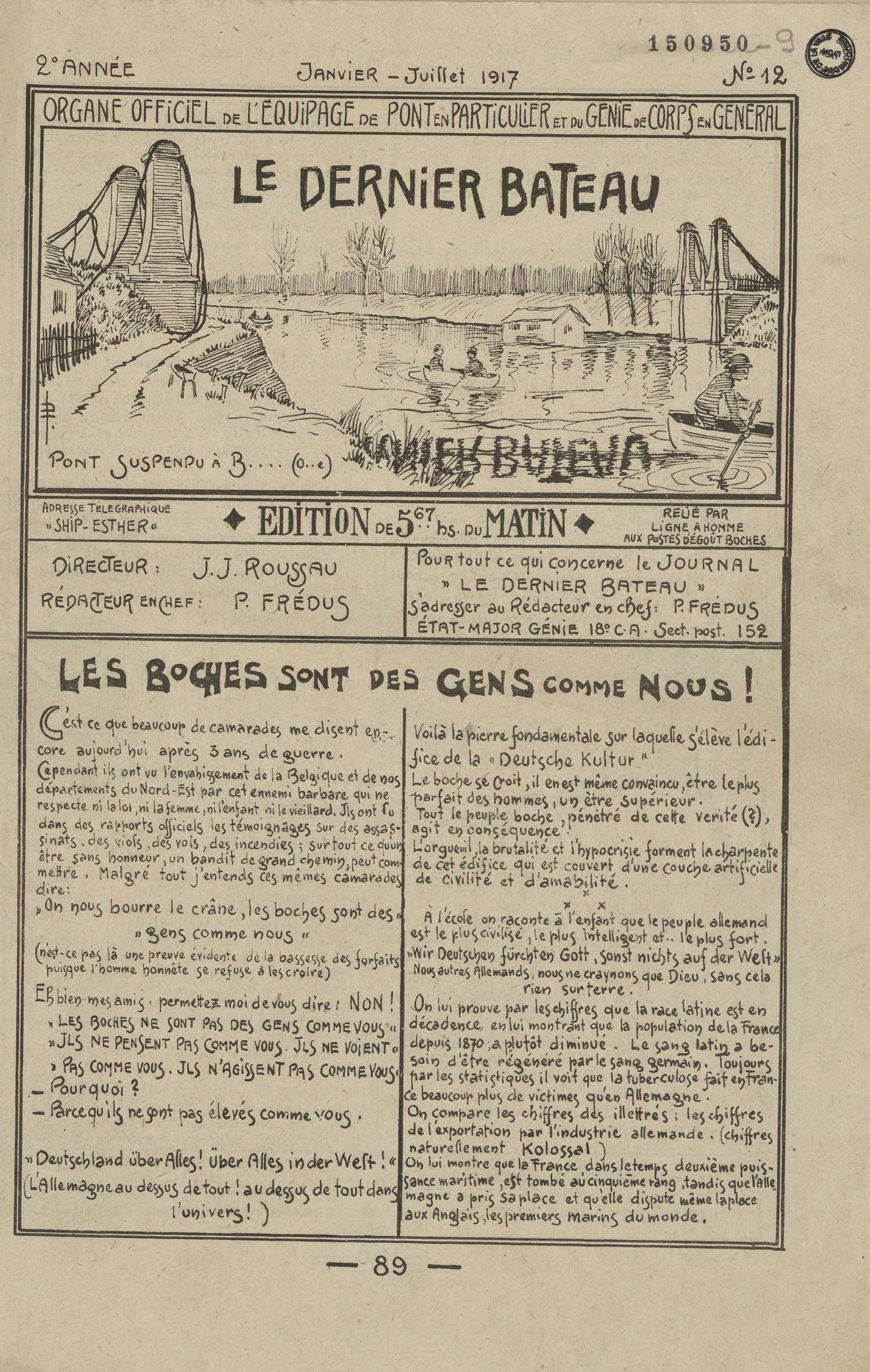 Le dernier bateau_janvier_juillet_1917